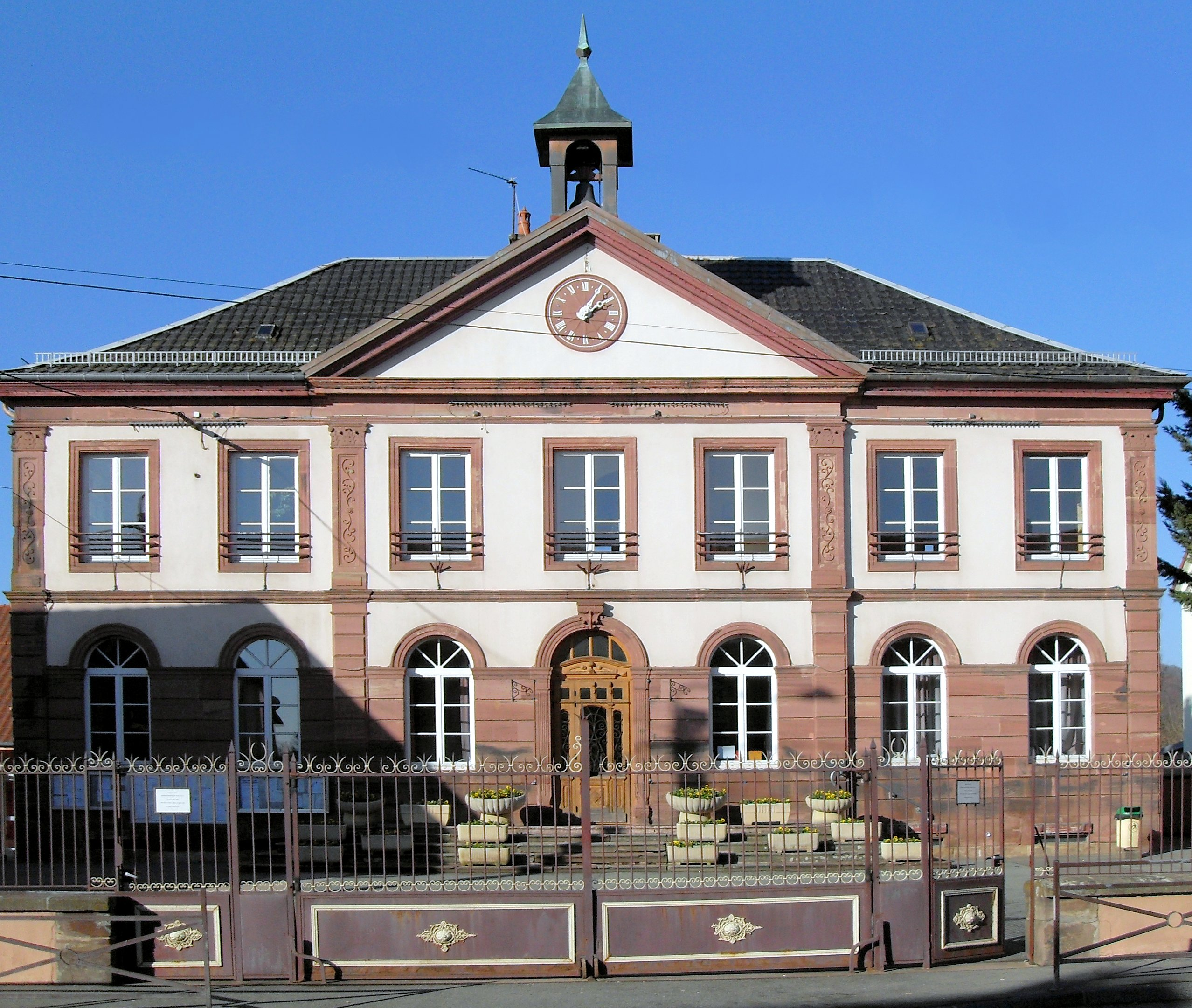 La mairie-école de Roppe